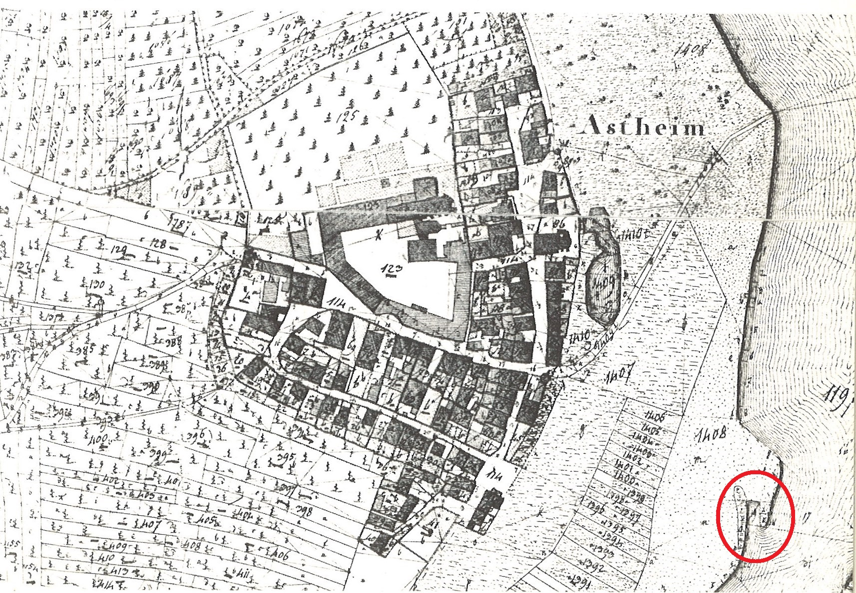 Markungsplan Astheims von 1835, Standort der Fähre eingekreist